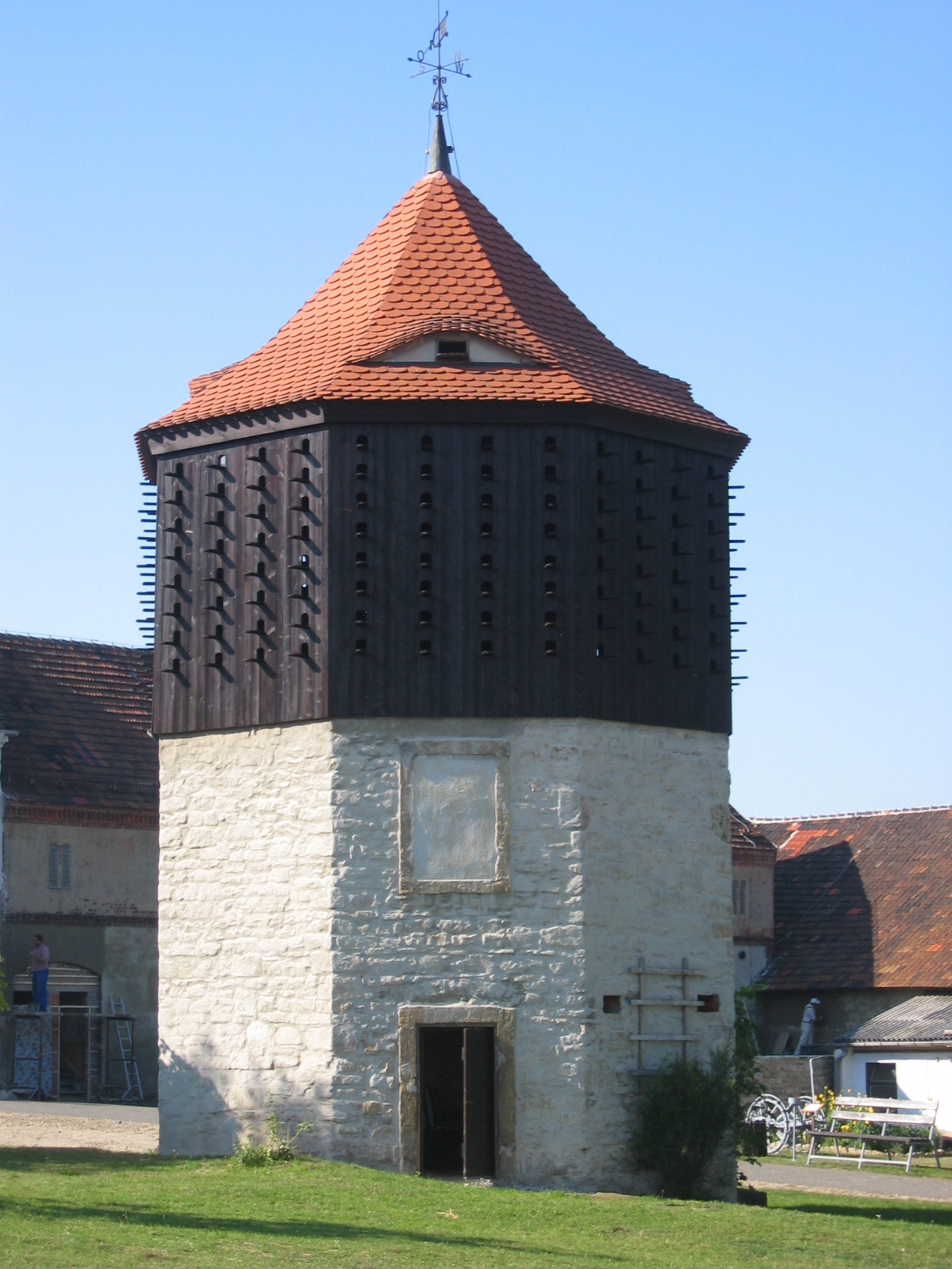 Kloster Posa Taubenhaus